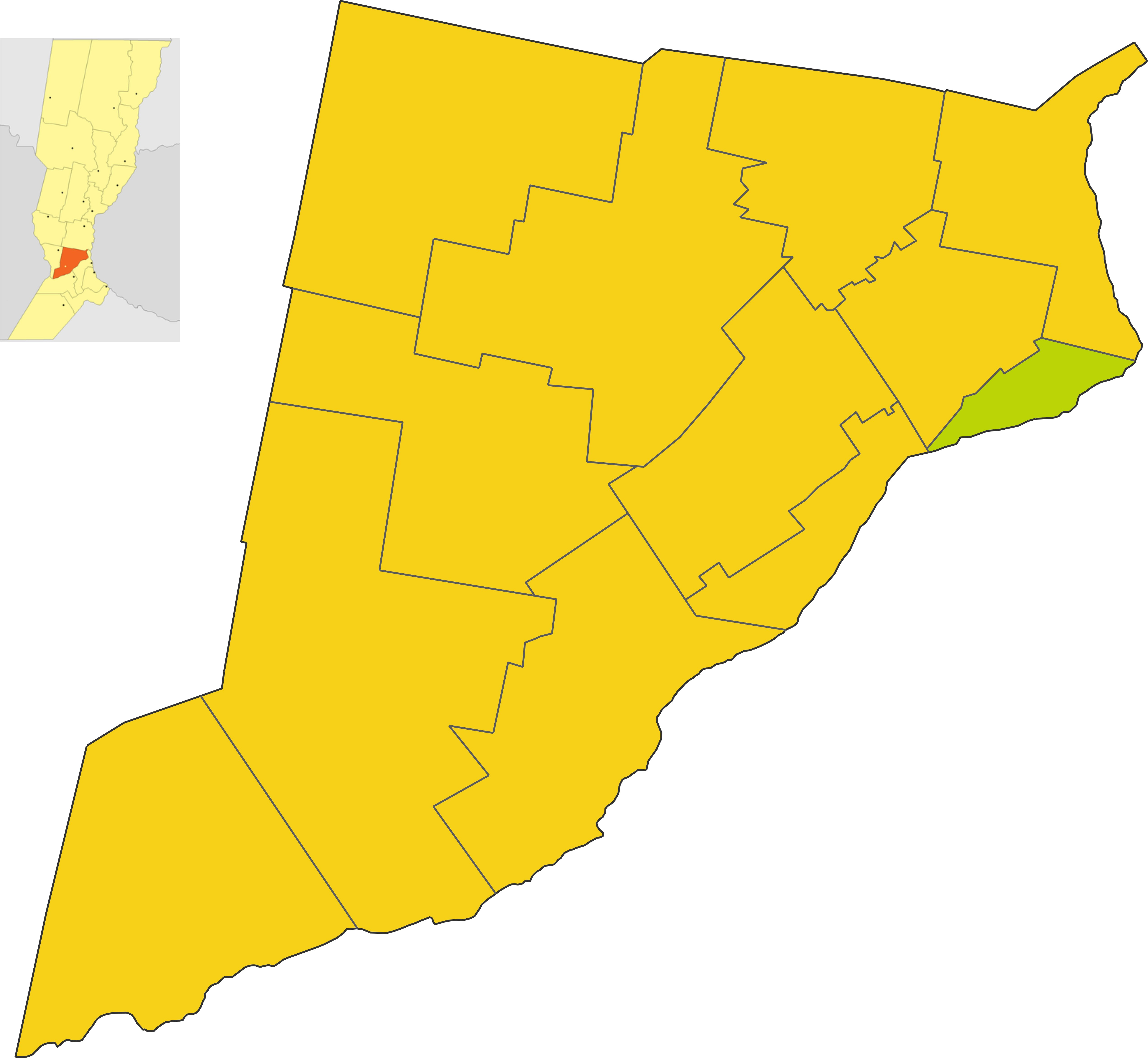 Map of the comuna de Pueblo Andino in Iriondo department, Santa Fe province, Argentina